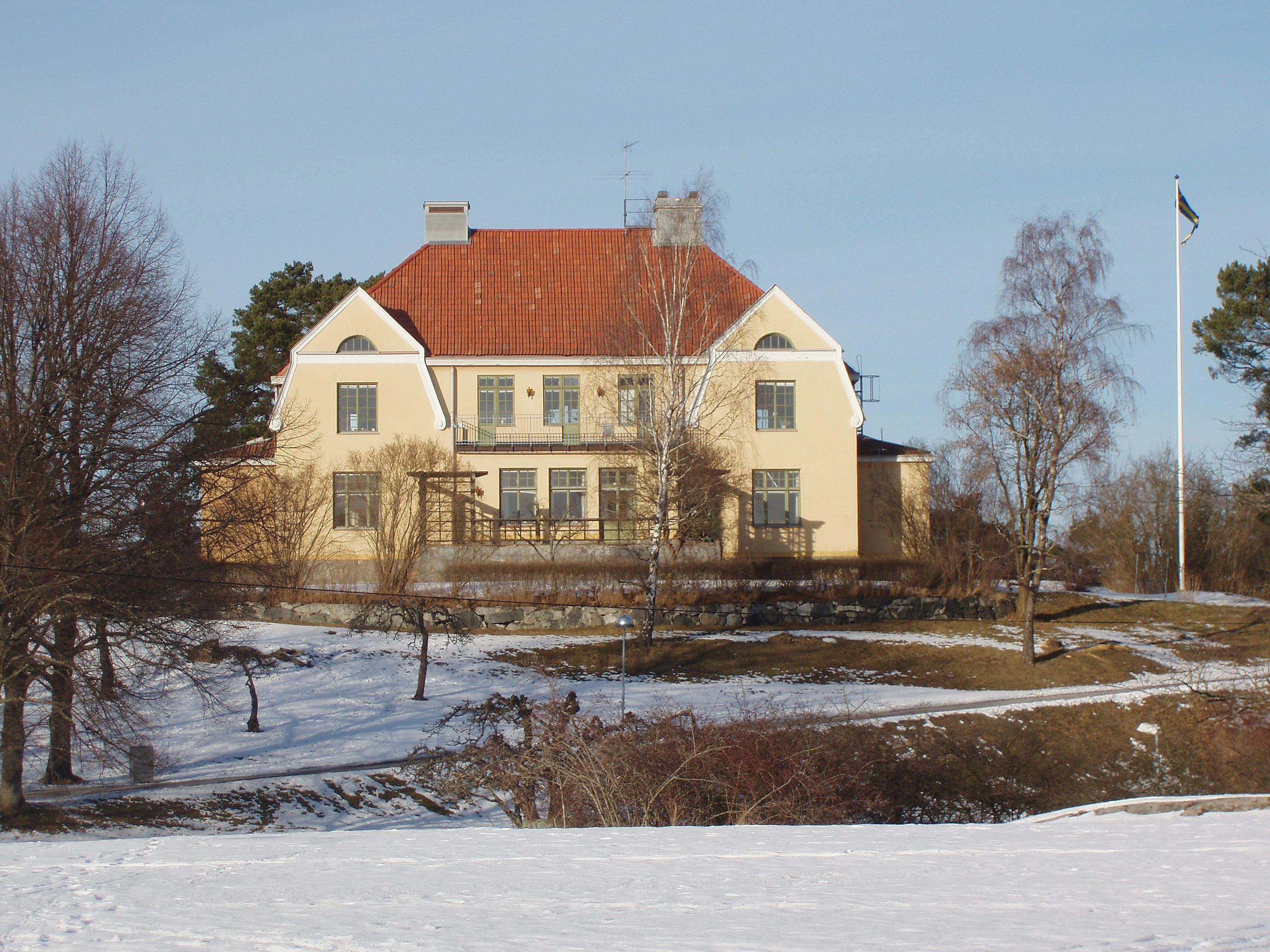 Grönsta prästgård, kyrkoherdeboställe för Lidingö församling. Huset uppfördes 1910. Arkitekt var Per Olof Hallman.